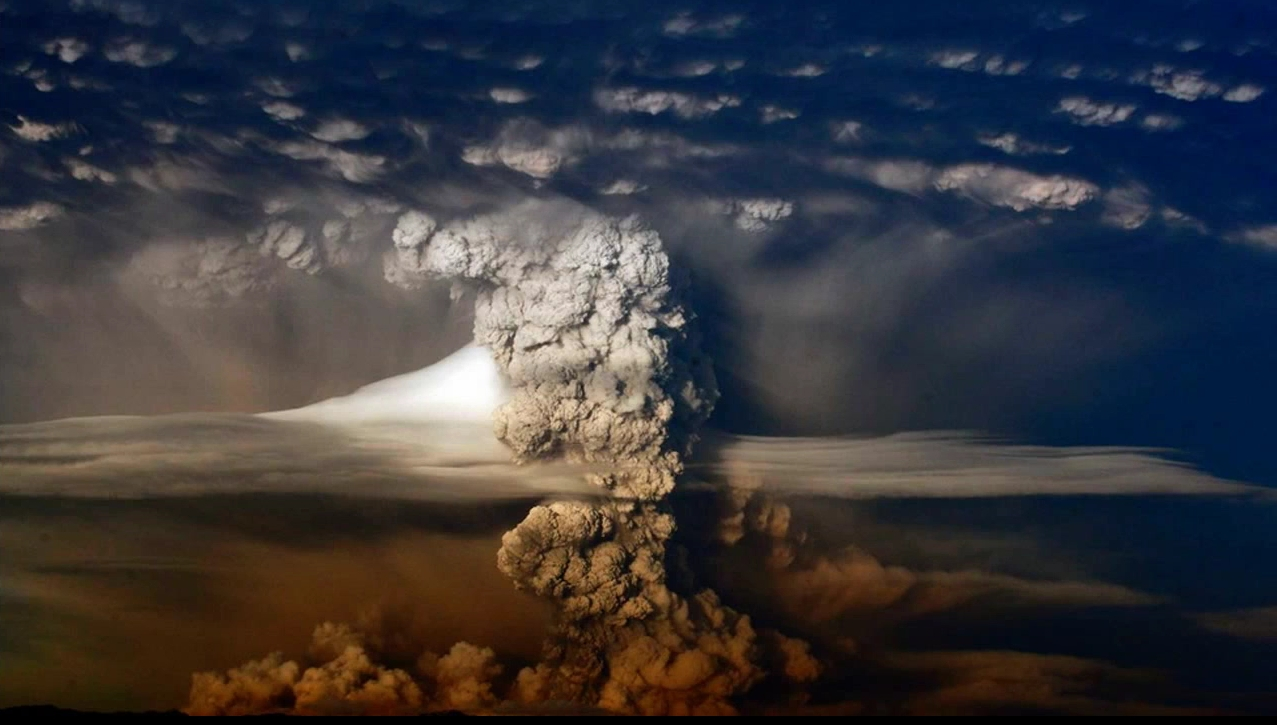 Isso.... apenas isso.... palav